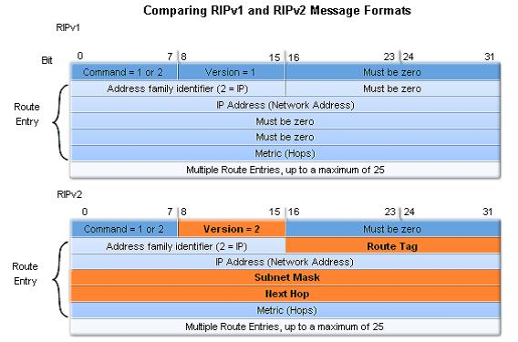 Монгол: а